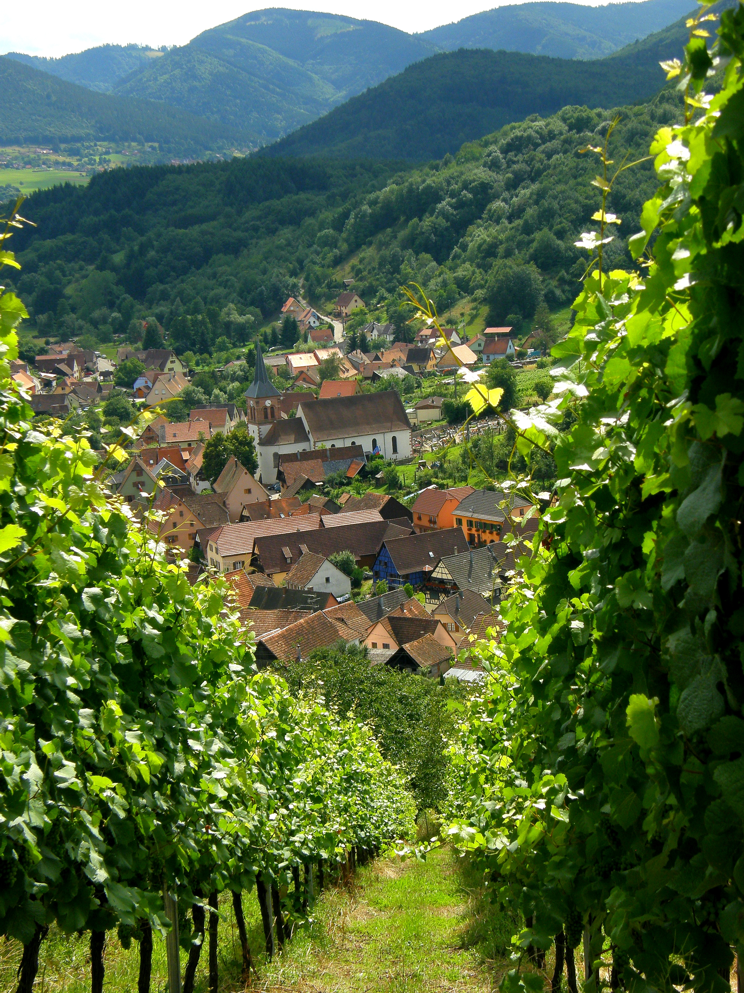 Albé, Bas-Rhin, Alsace, France.